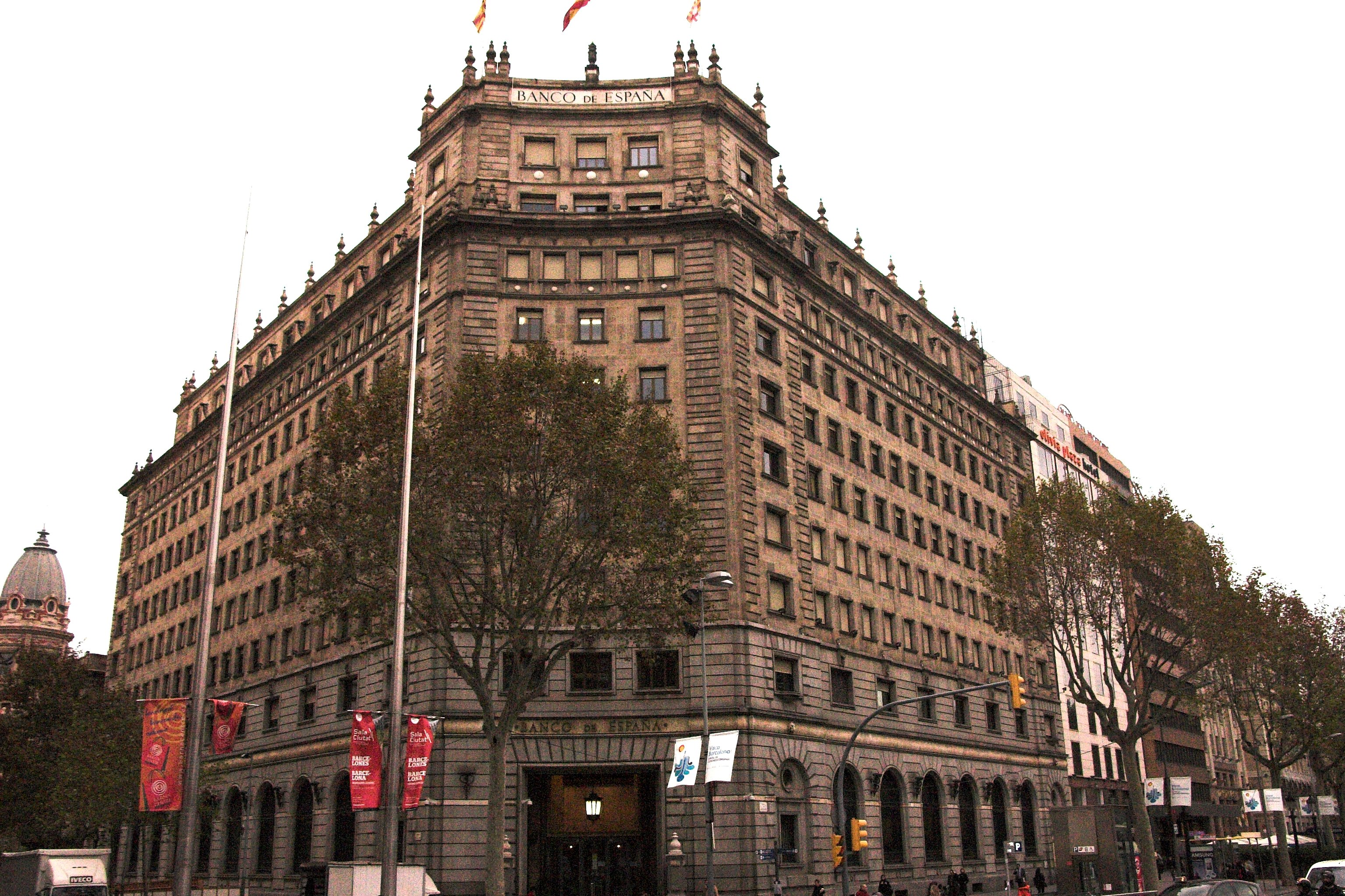 Seu del Banc d'espanya a Barcelona (Catalunya).